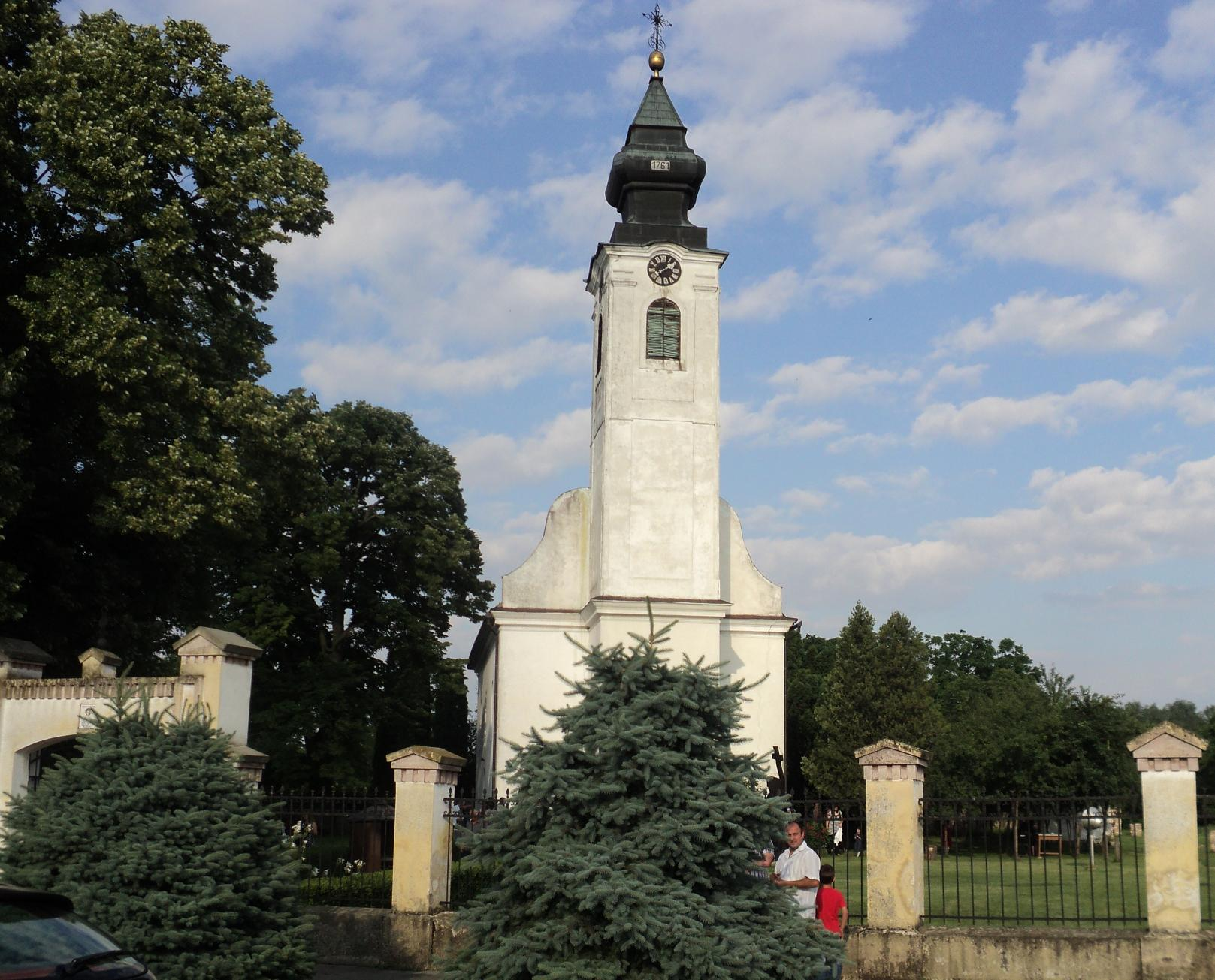 Православна црква Светог Стефана у Борову (Борово село)